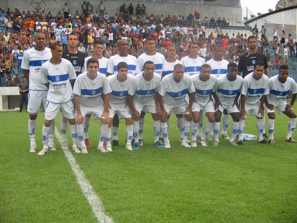 Formação profissional do Olaria Atlético Clube, vice-campeão da Série B do Rio de Janeiro em 2009.